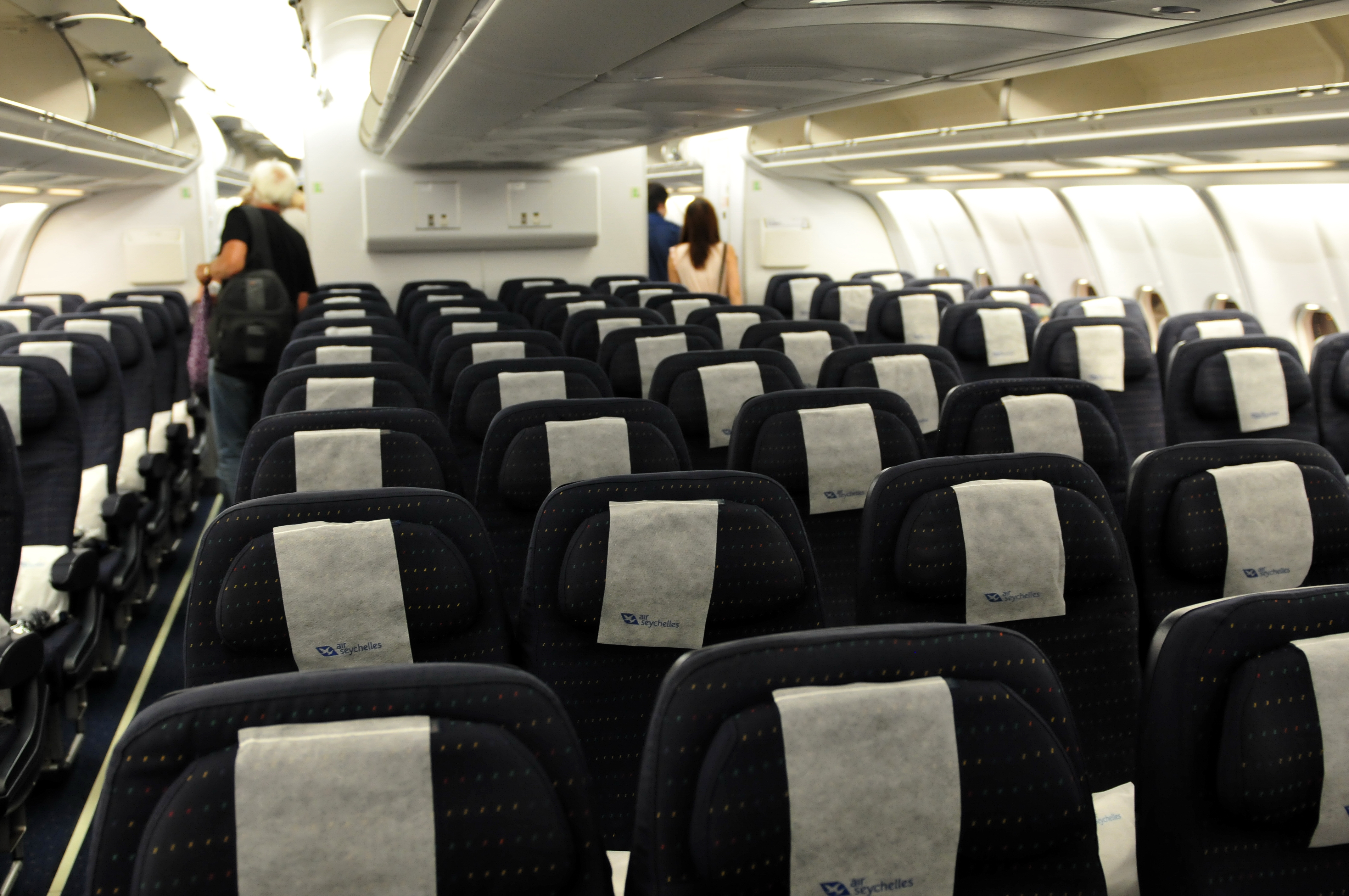 Wikimania 2013 Hongkong